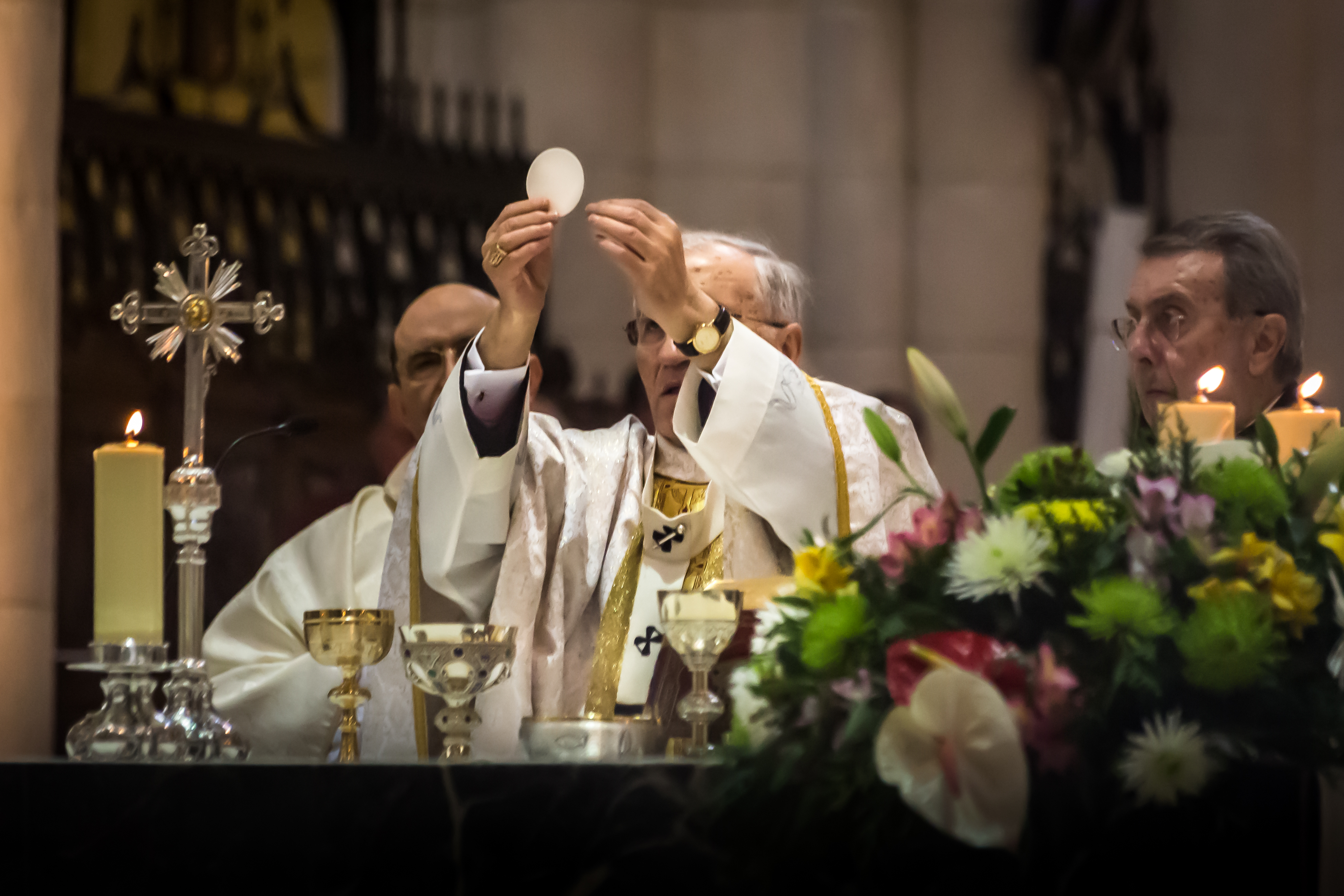 Cardenal Rouco Varela oficiando la misa de la Jornada de la Vida Consagrada. Catedral de la Almudena, Madrid.